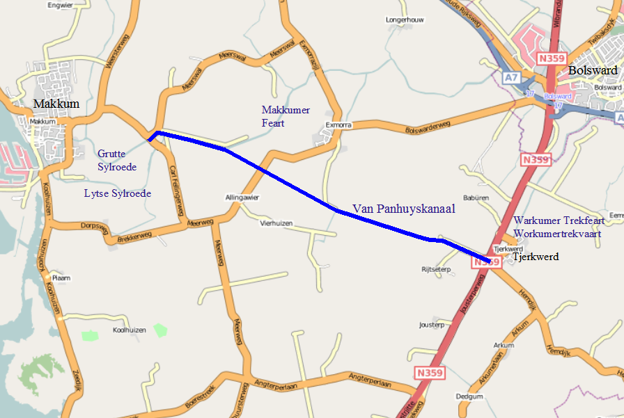 Van Panhuyskanaal in provincie Friesland